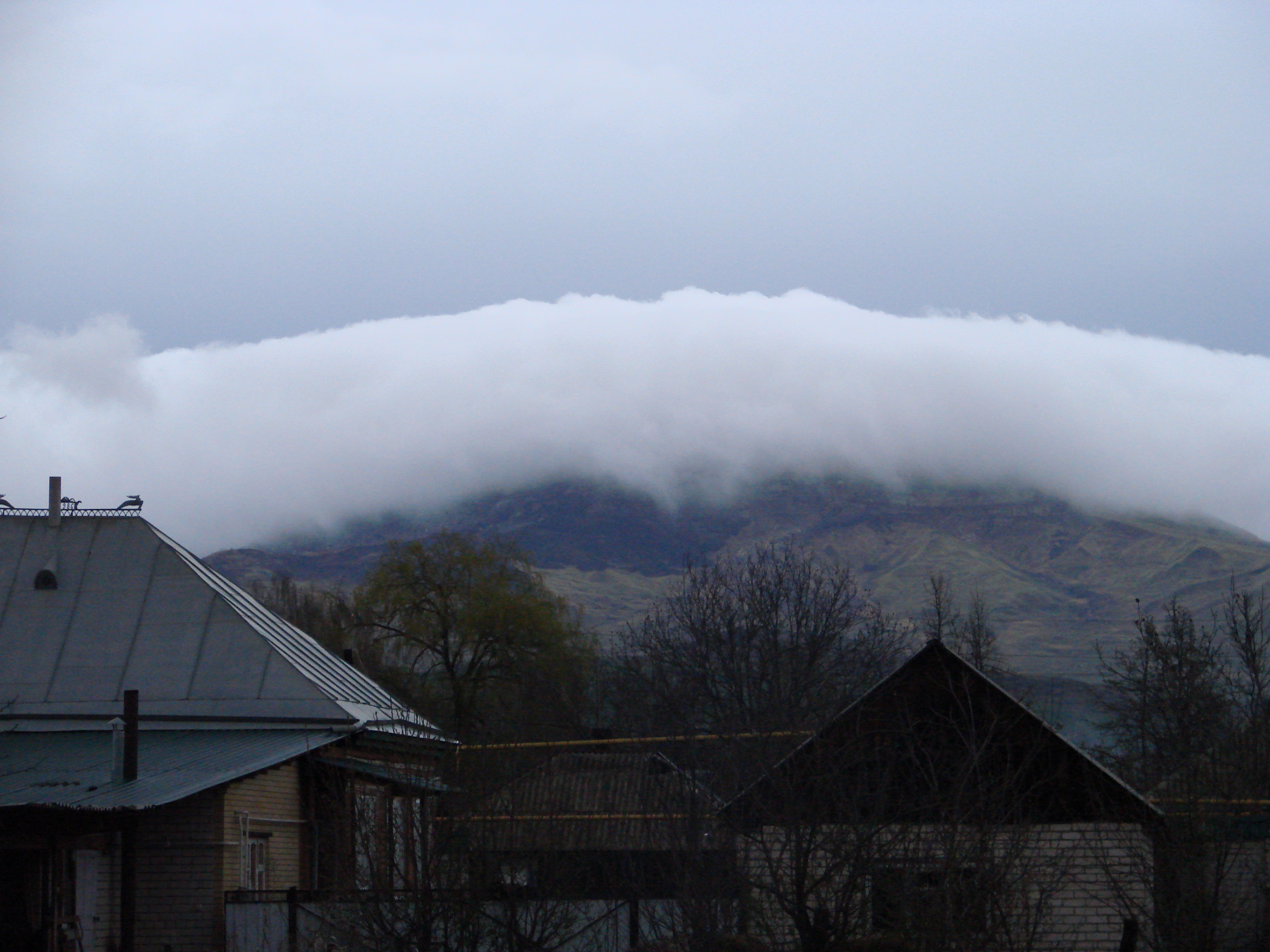 Zelenchukskaya, Karachay-Cherkessia, Russia